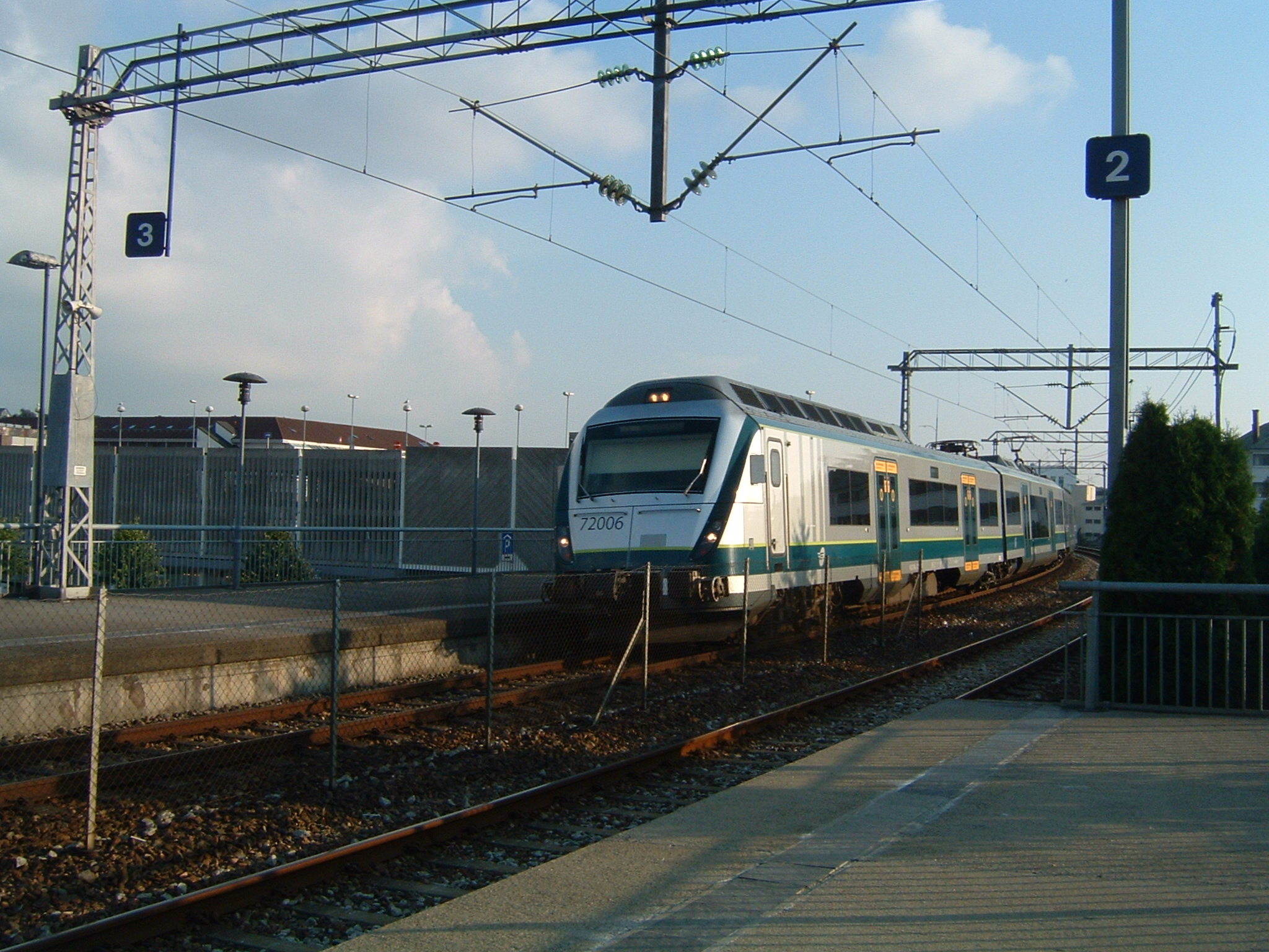 Lokaltog fra Egersund ankommer Sandnes Stasjon fra Sandnes Holdeplass.